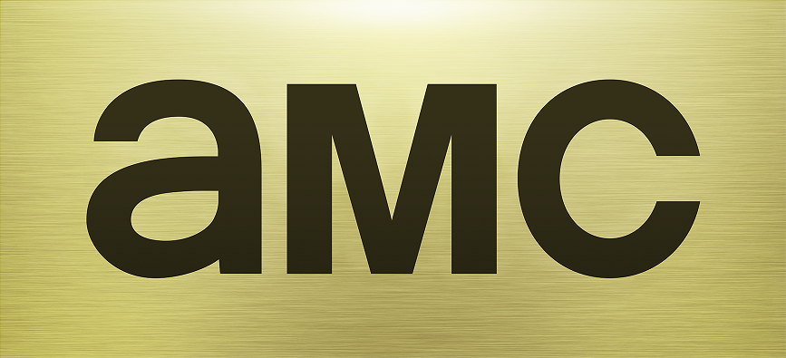 AMC logo